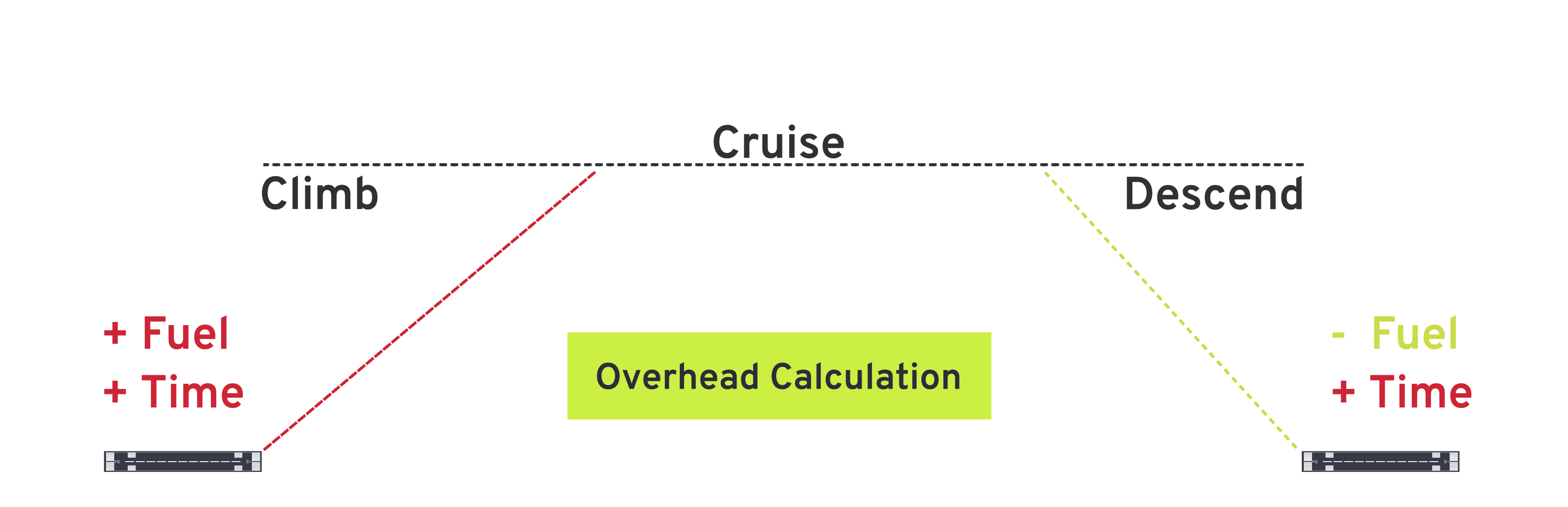 Grafische Darstellung der Overhead-Calculation für die Trip Fuel (TF) Berechnung eines kommerziellen Luftfahrzeug